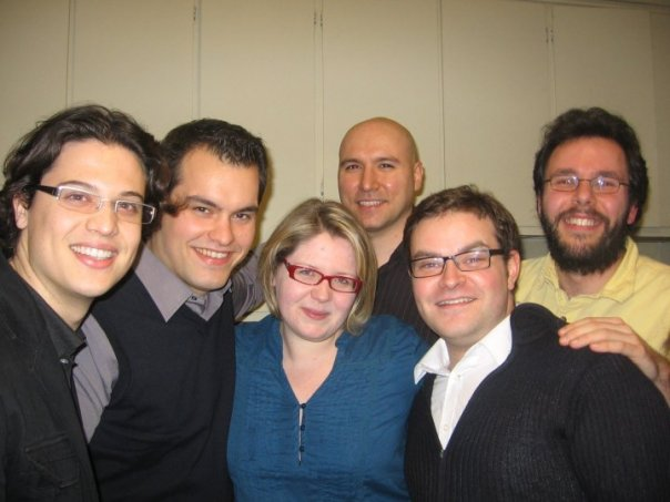 Les chefs du Caucus des bleus du Parlement étudiant du Québec. De gauche à droite: Ludovic Soucisse (24e), Pierre McCann (23e), Julie-Maude Normandin (19e), François Milette (21e), Alexis Lacombe (25e) et Alexis Gagné-Lebrun (22e).